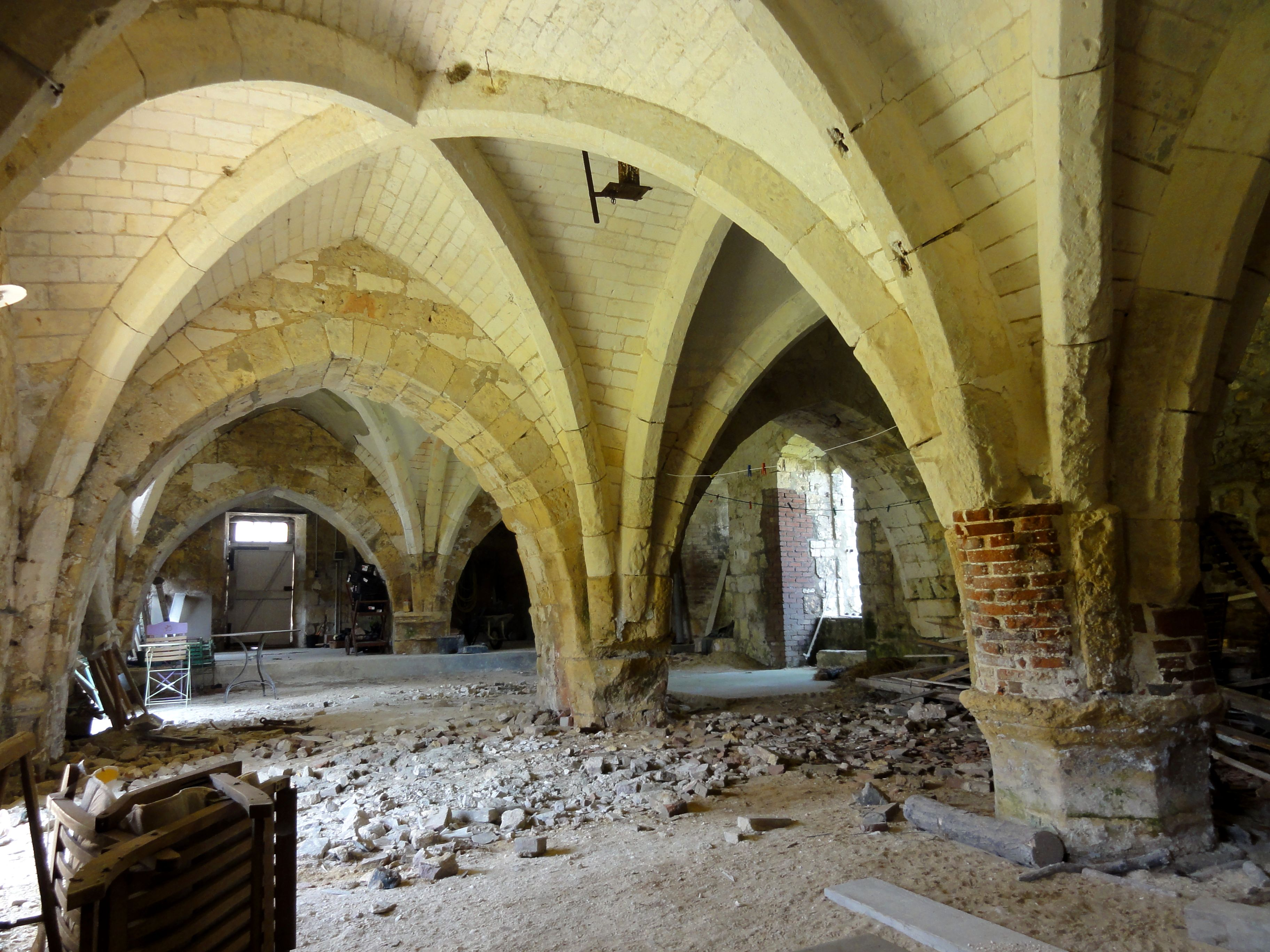 Le cellier de l'abbaye.